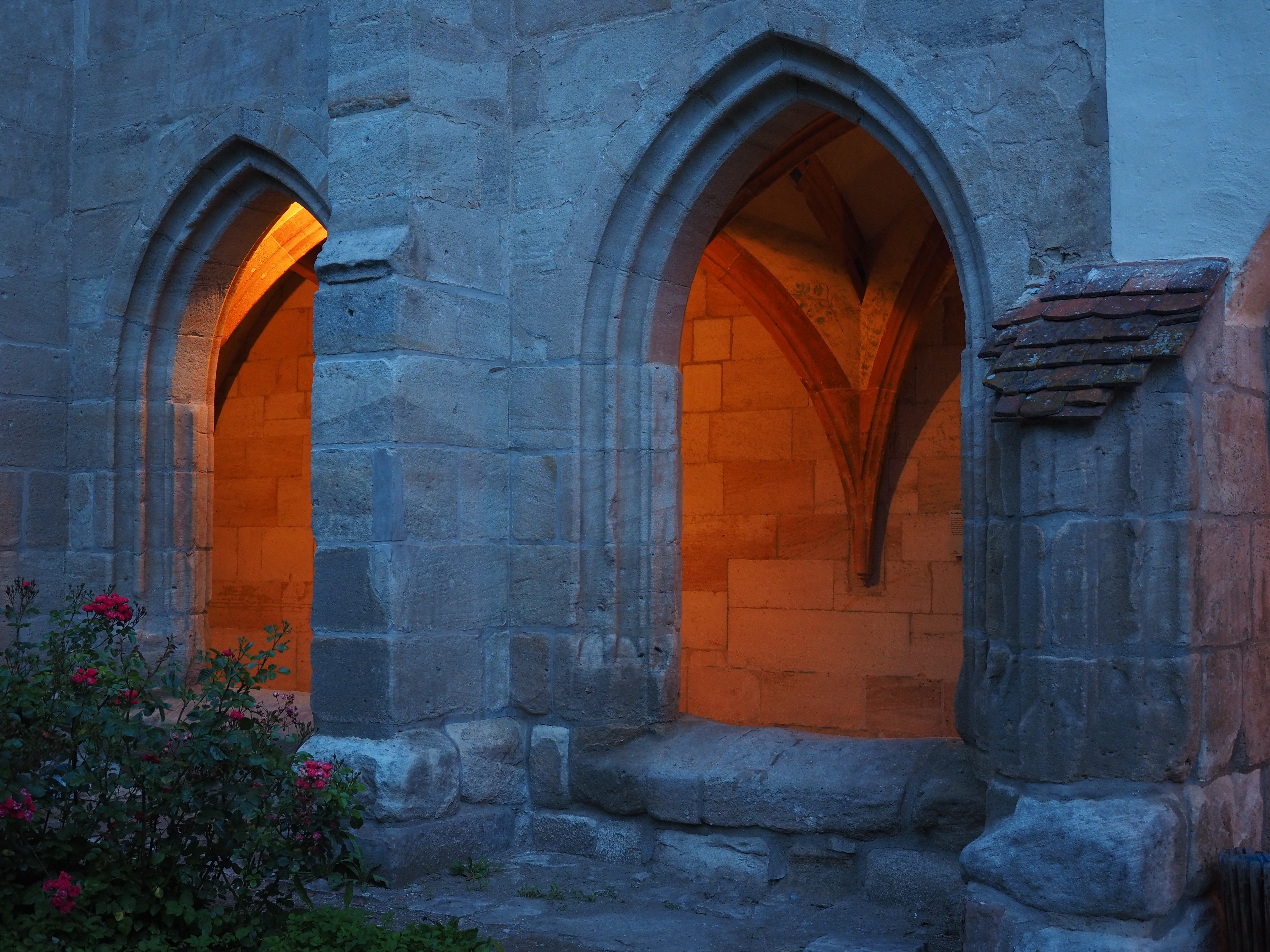 Kloster Lorch